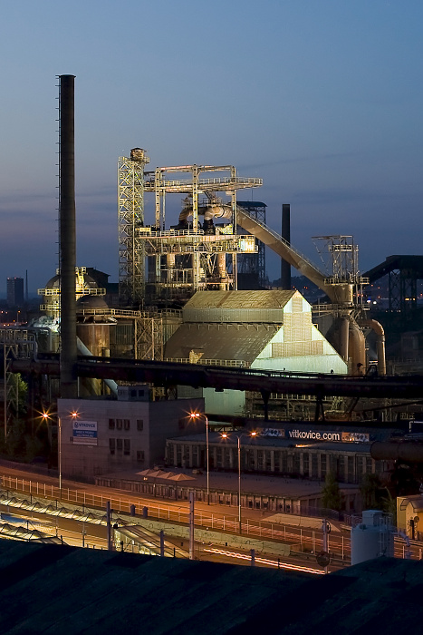 Vysoké pece Vítkovice